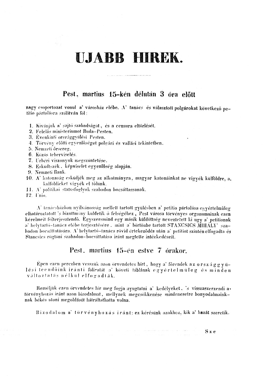 A Pesti Hirlap 1848. március 16-ai melleklete